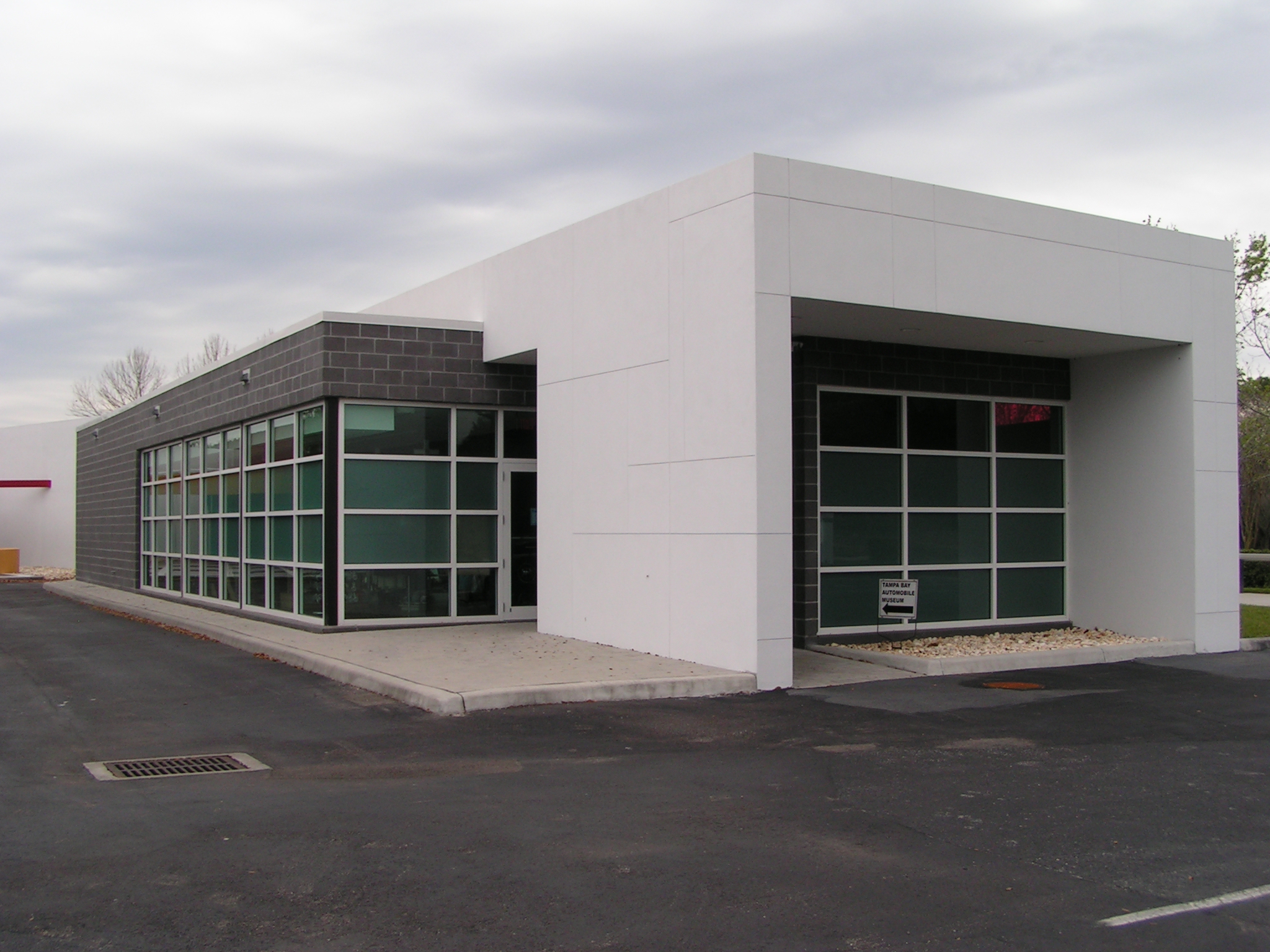 Tampa Automobile Museum